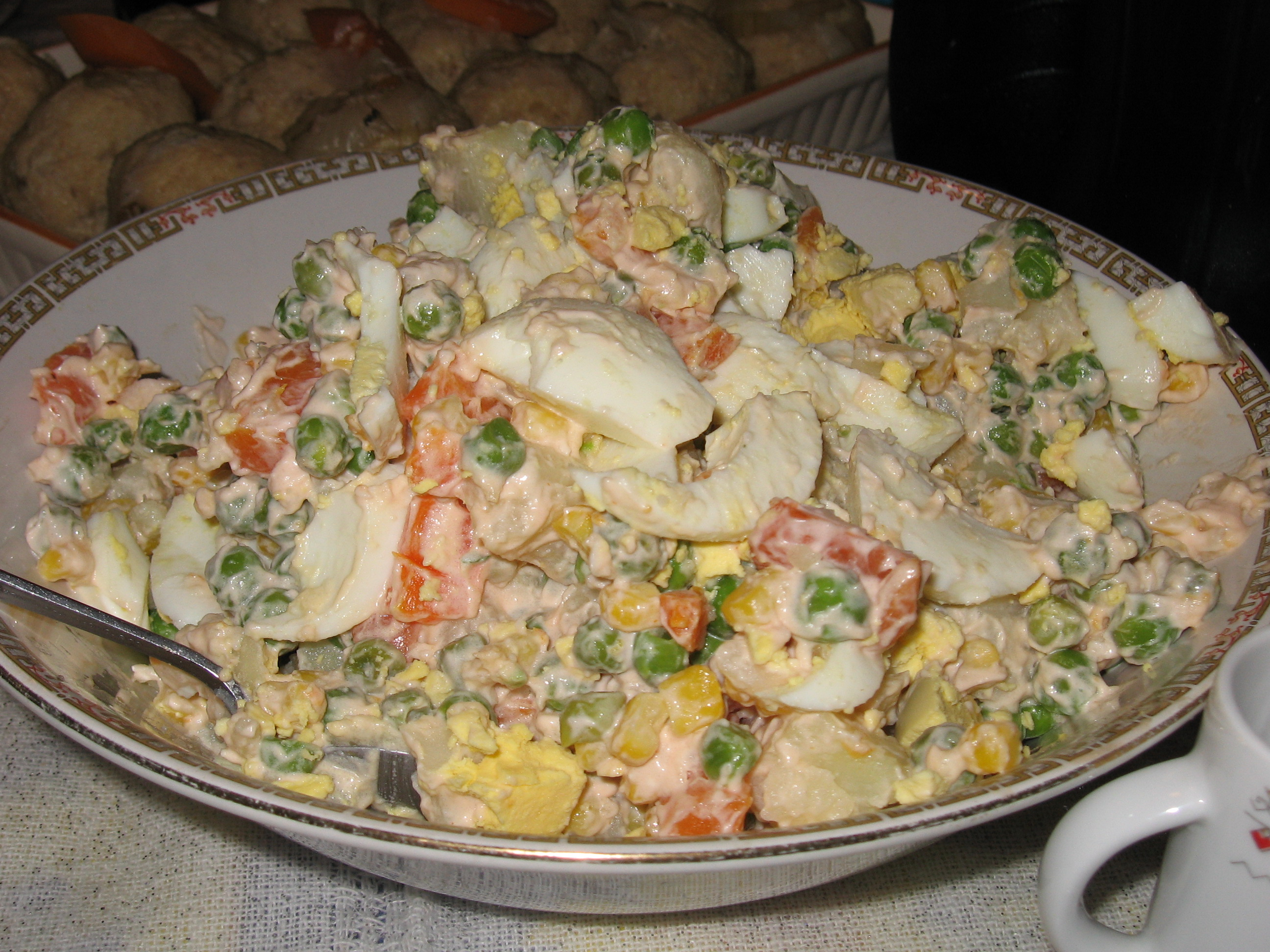 Mayonnaise salad (Russian salad). I took this picture on Passover evening ("Leil Haseder"). La ensaladilla rusa es un plato habitual en bares de España. Se come como acompañamiento o tapa.